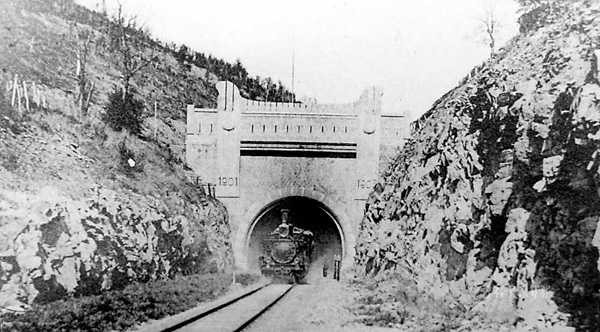 1904年通车的东清铁路兴安岭隧道